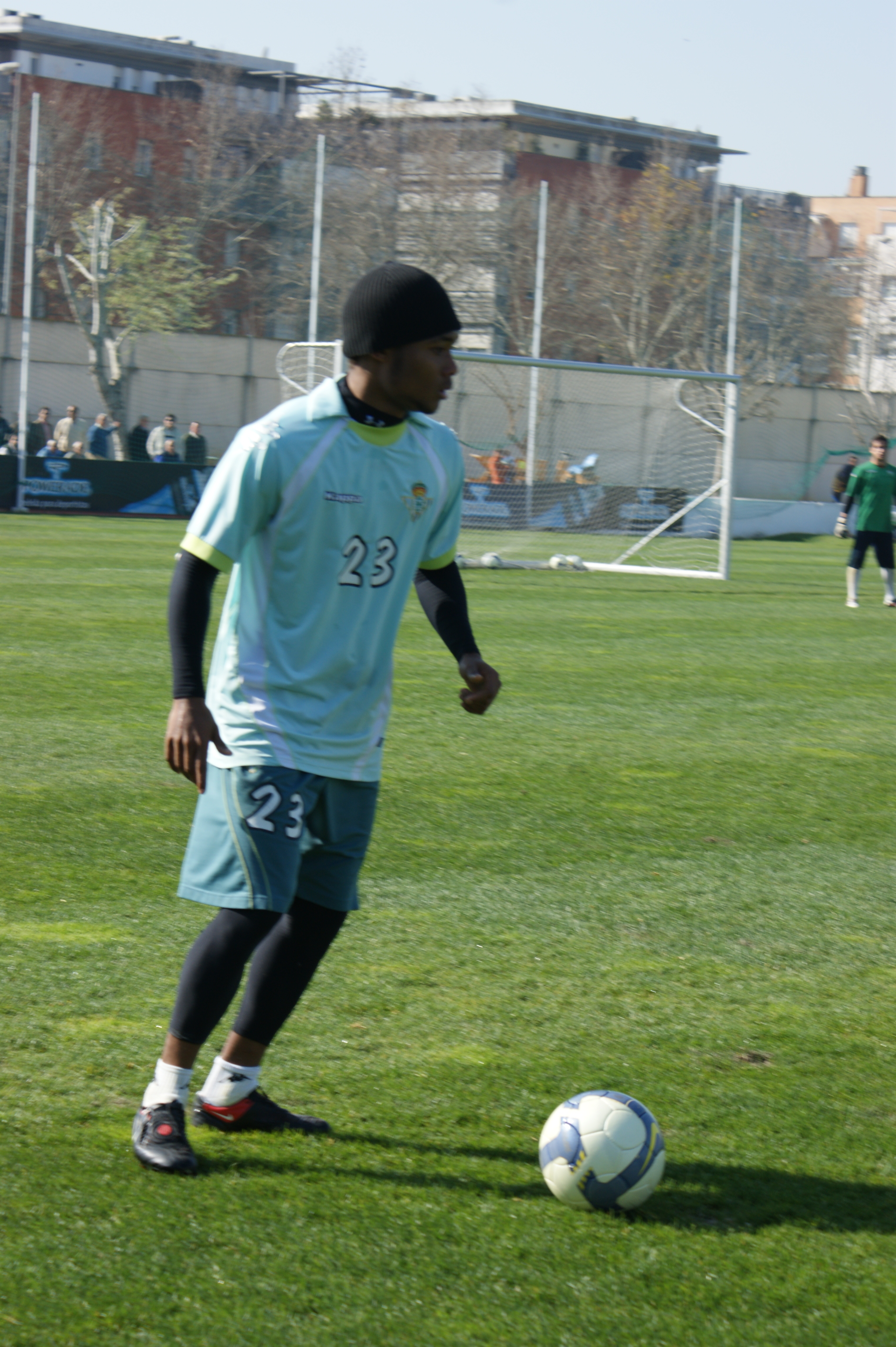 Nelsón entrenando en la ciudad deportiva "Manuel Ruiz de Lopera"